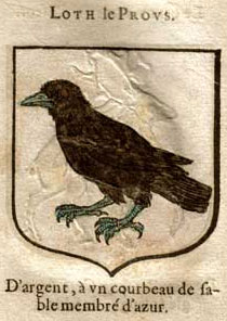 Lot le Preux